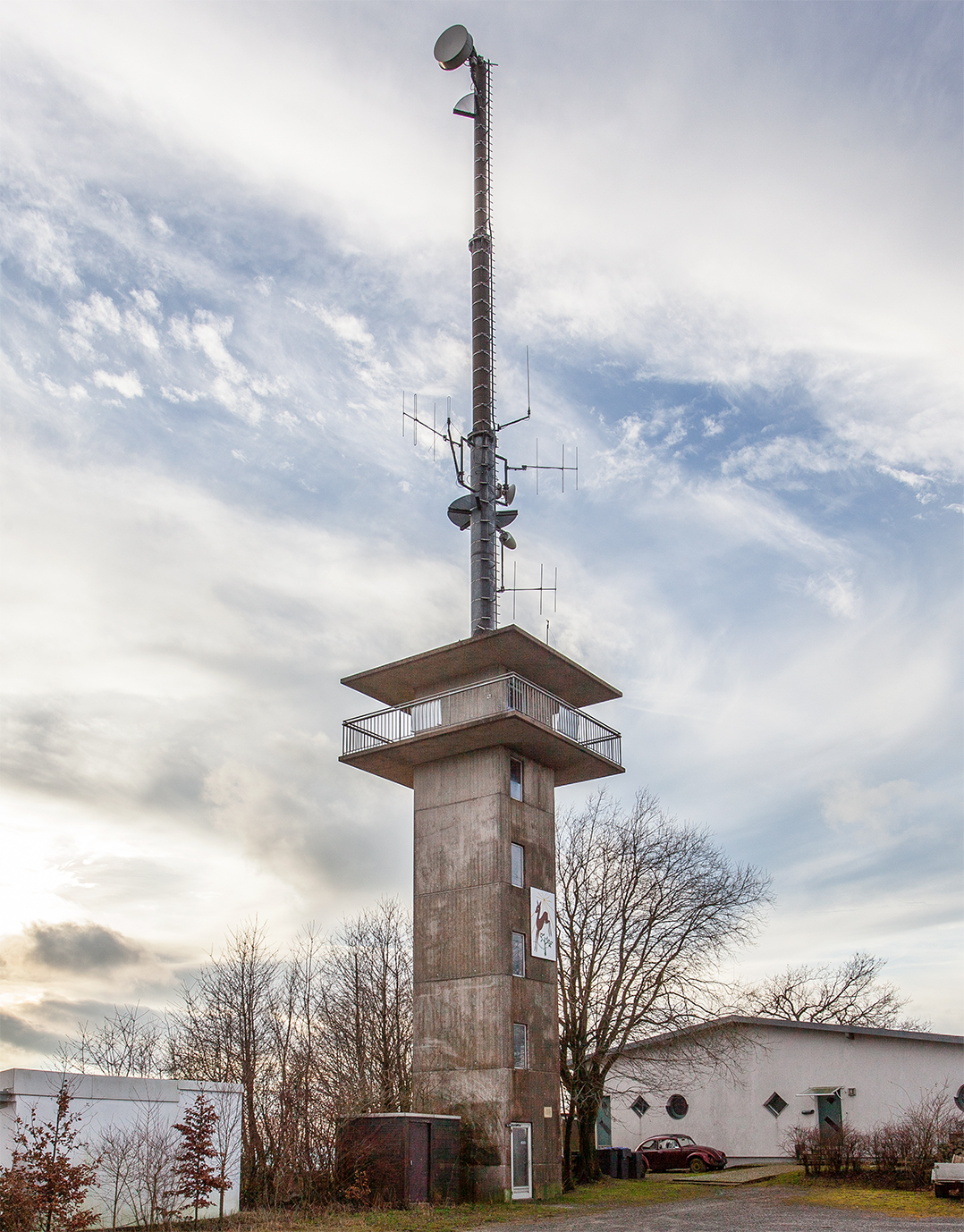 Aussichtsturm Hohe Asch